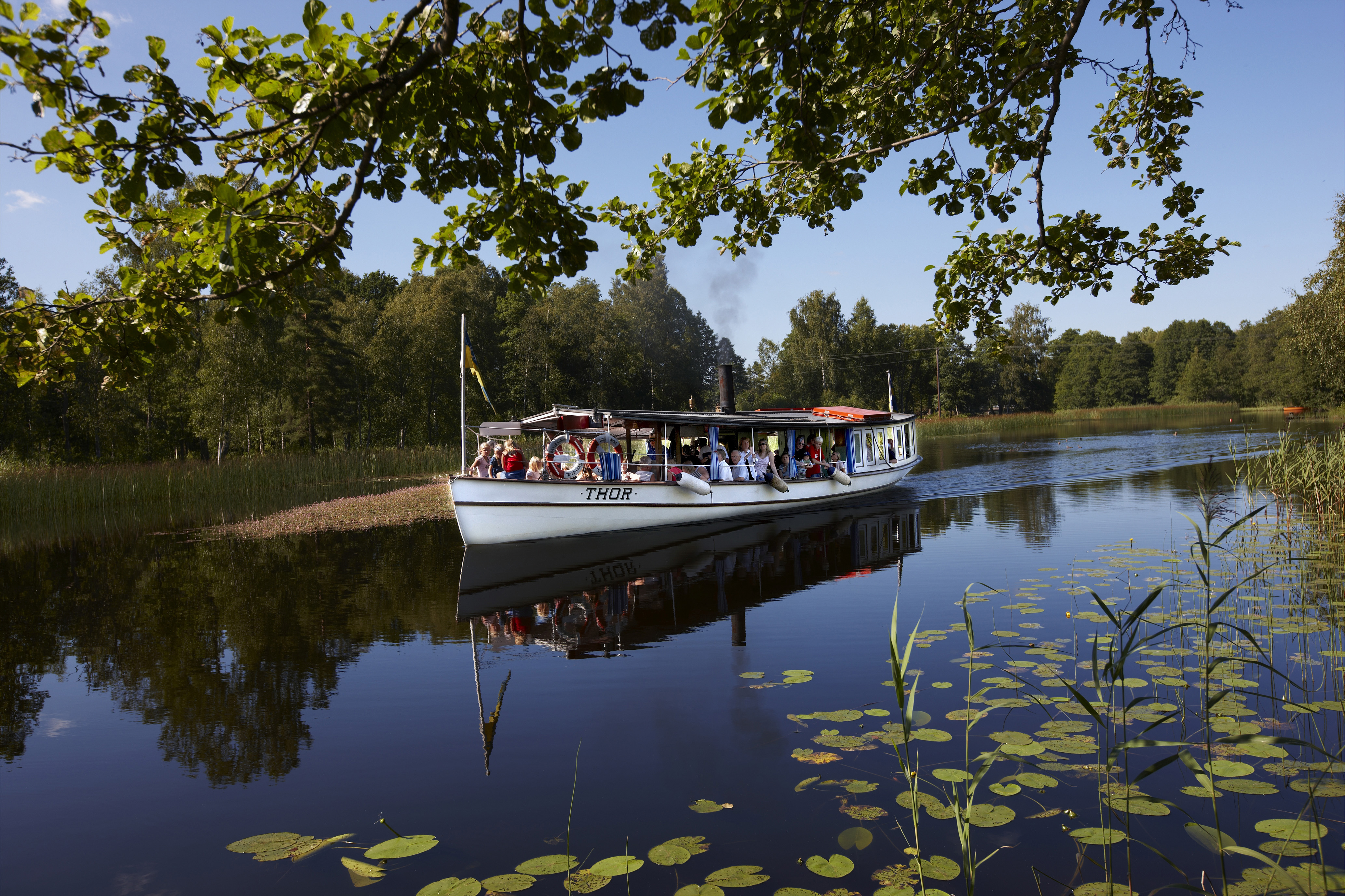 Bild från Åby sluss ångaren Thor